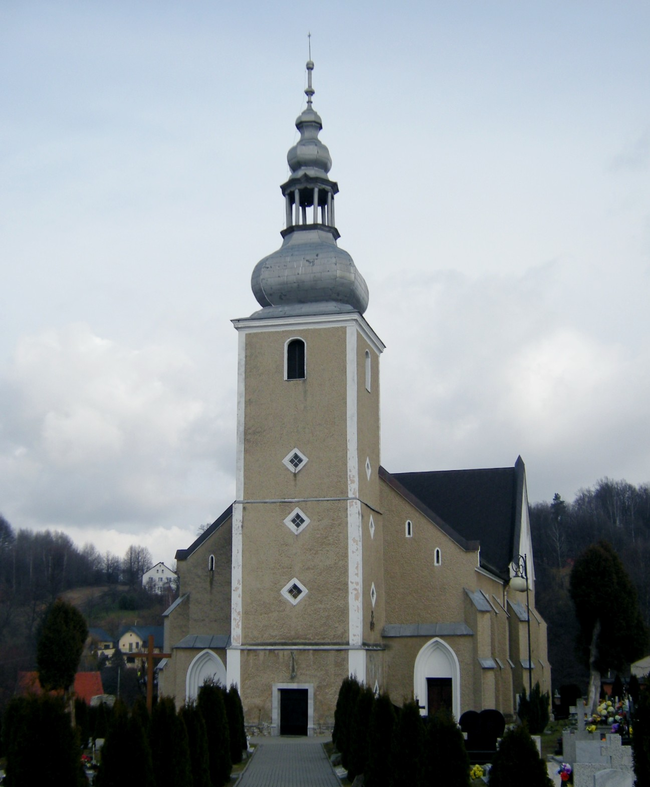 Gierałcice - kościół parafialny p.w. św. Michała Archanioła, 1869-1891, wieża z 1615 (zabytek nr 1110/66 z 5.02.1966)